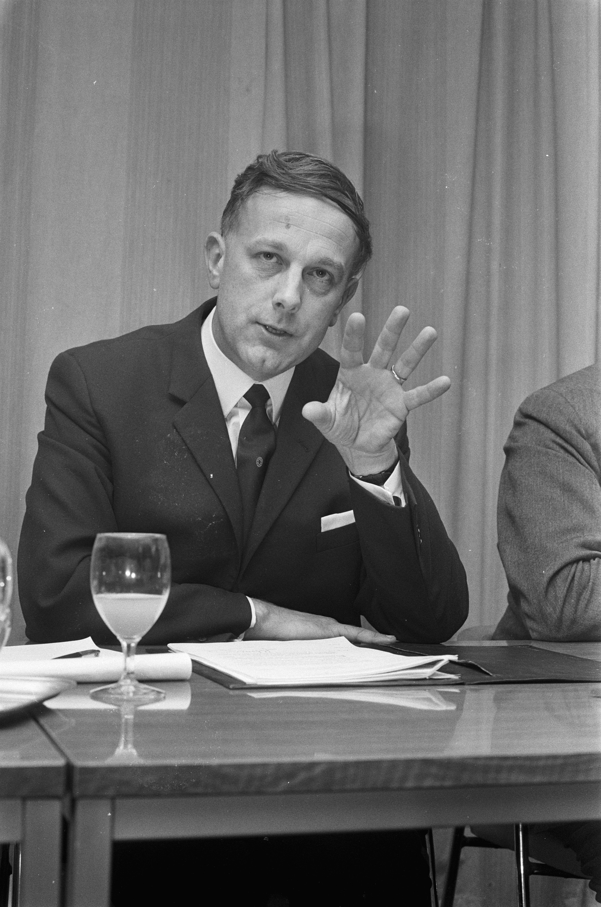 Prof. P.A.J.M. (Piet) Steenkamp (KVP), was grondlegger van het CDA, Eerste Kamervoorzitter en kabinetsformateur. Den Haag, Nederland, 18 juni 1971.